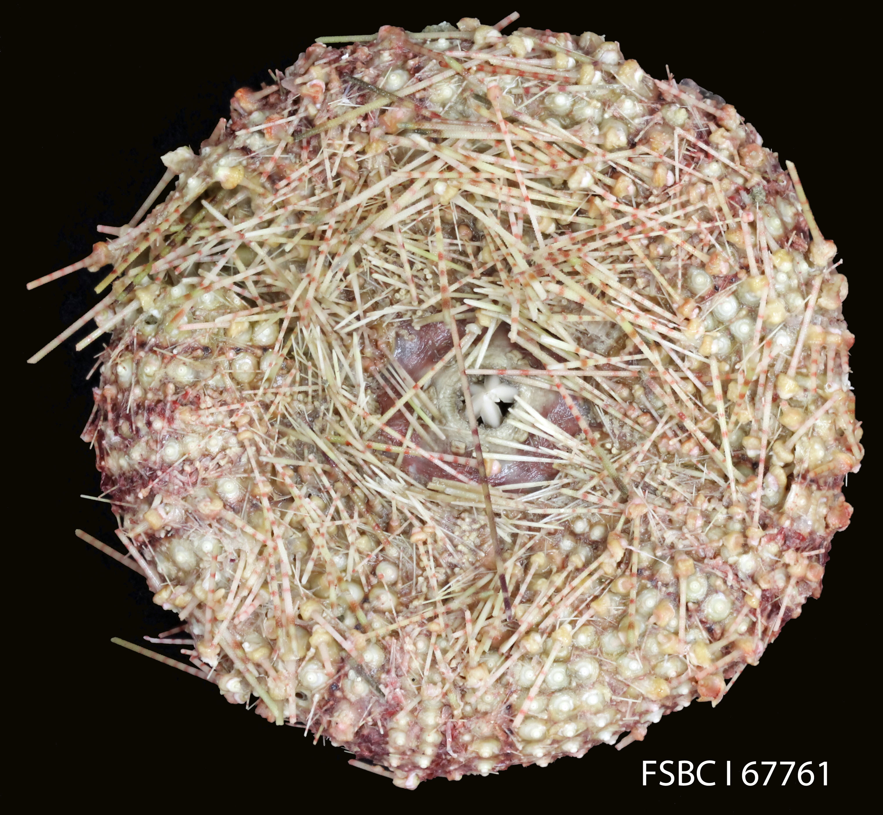 Scientific name: Astropyga magnifica'